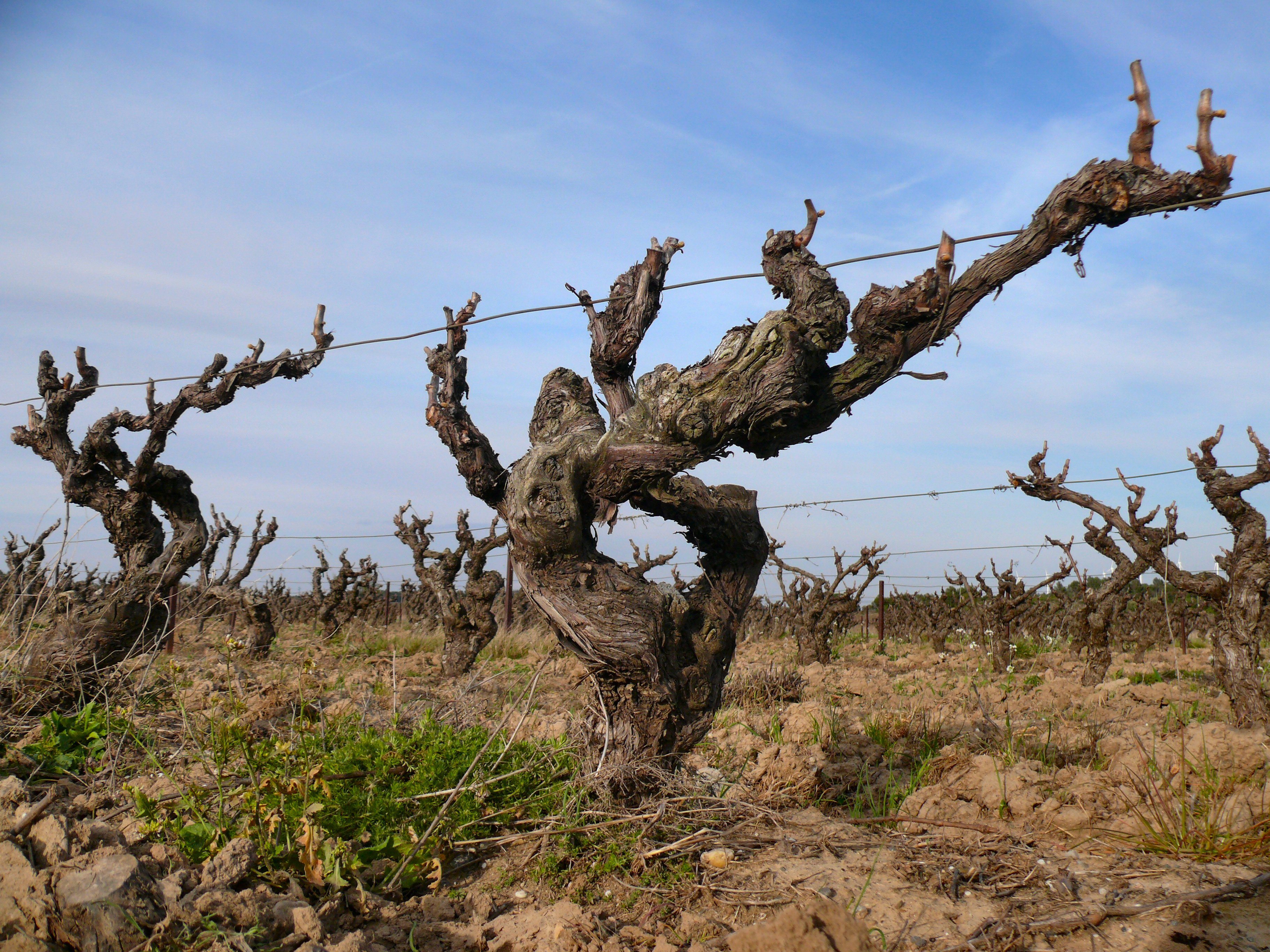 From author: "Ceps de vigne au Nord des Corbières. Prise à Montbrun-des-Corbières, Languedoc-Roussillon, Aude, France, Avril 2010"